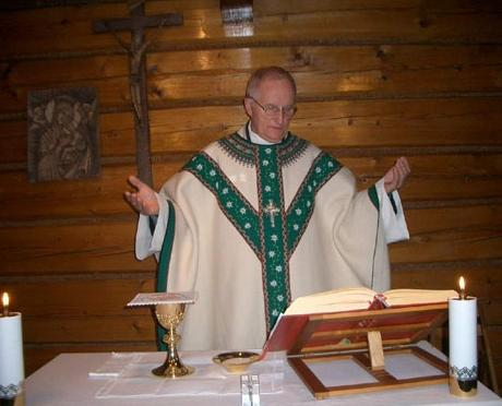 Wykonane podczas rekolekcji na Ryniasie